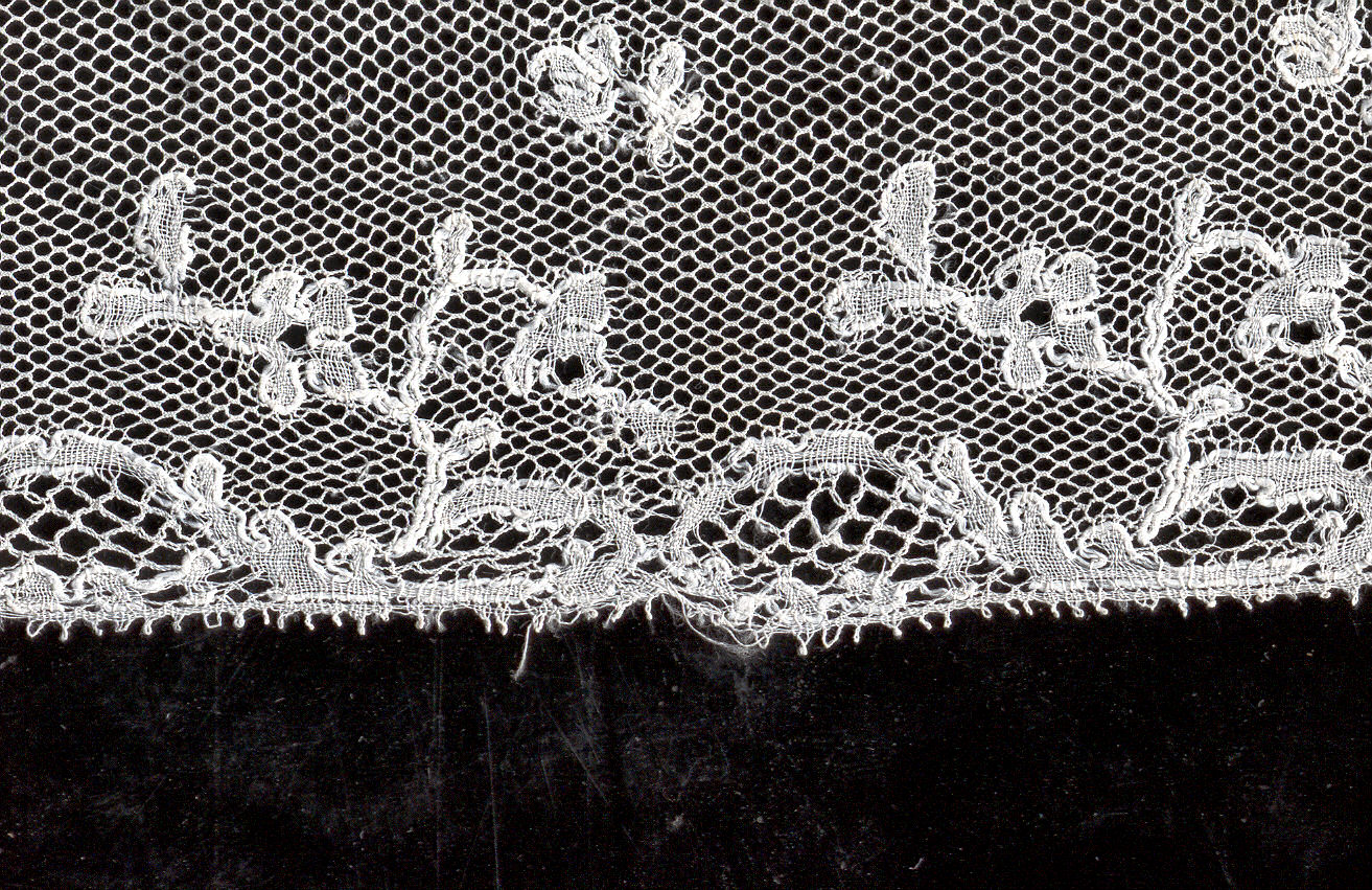 private collection